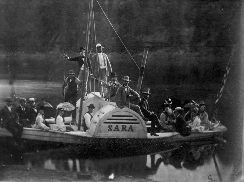 Den hånddrevne hjulbåten Sara på Nøklevann